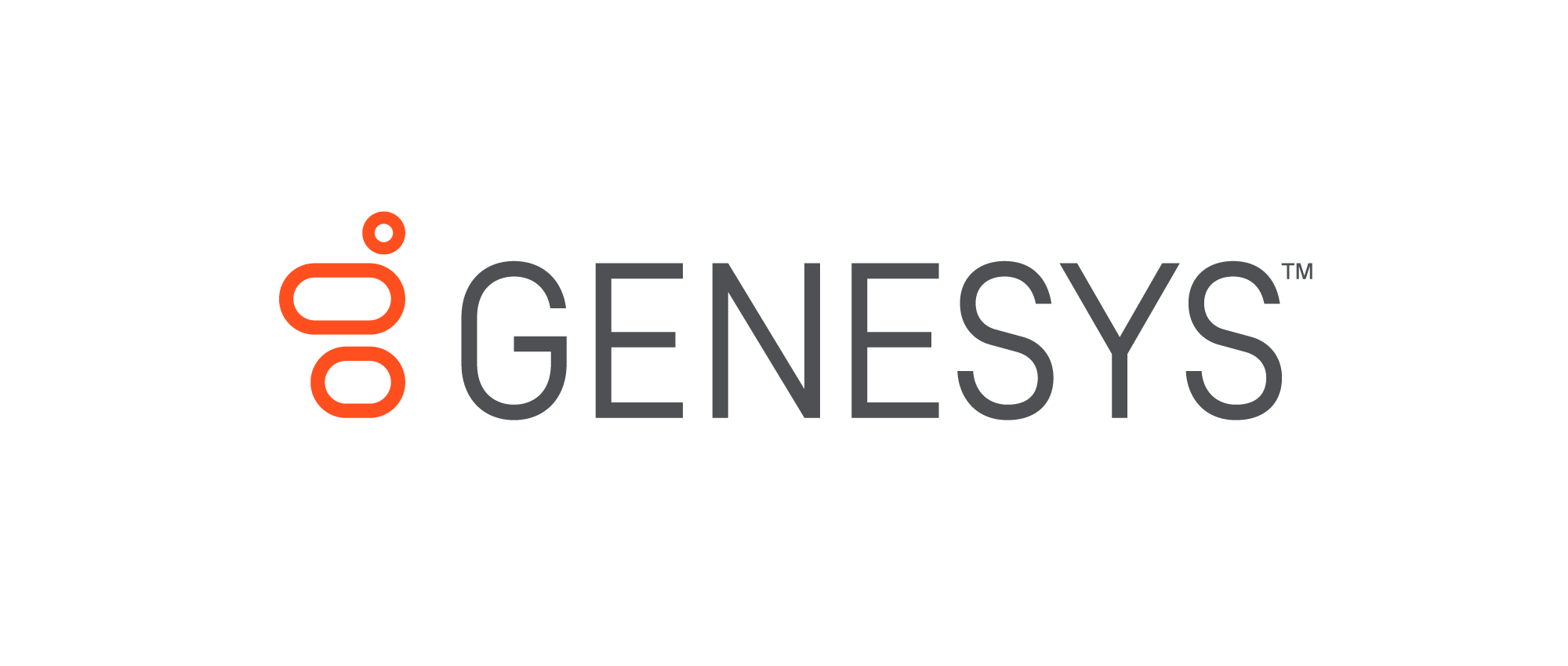 GEN_id_color_rgb